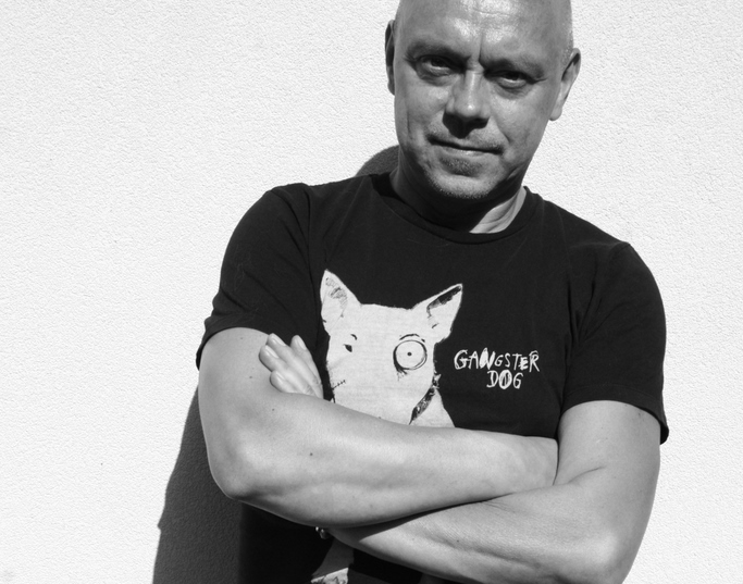 Piotr Adamczyk, pisarz i dziennikarz.